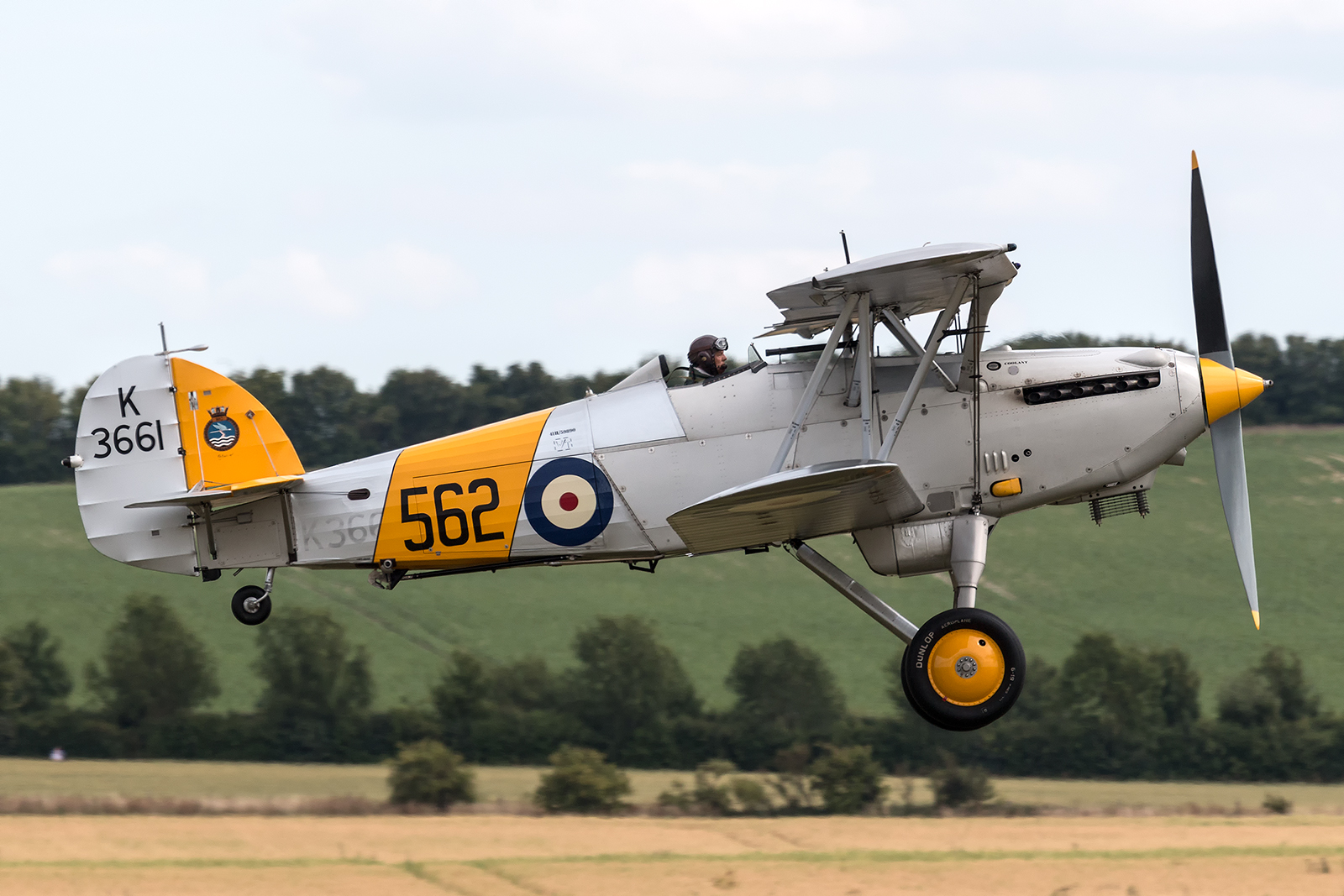 hawker nimrod ripreso durante l'ultimo Flying Legends 2015